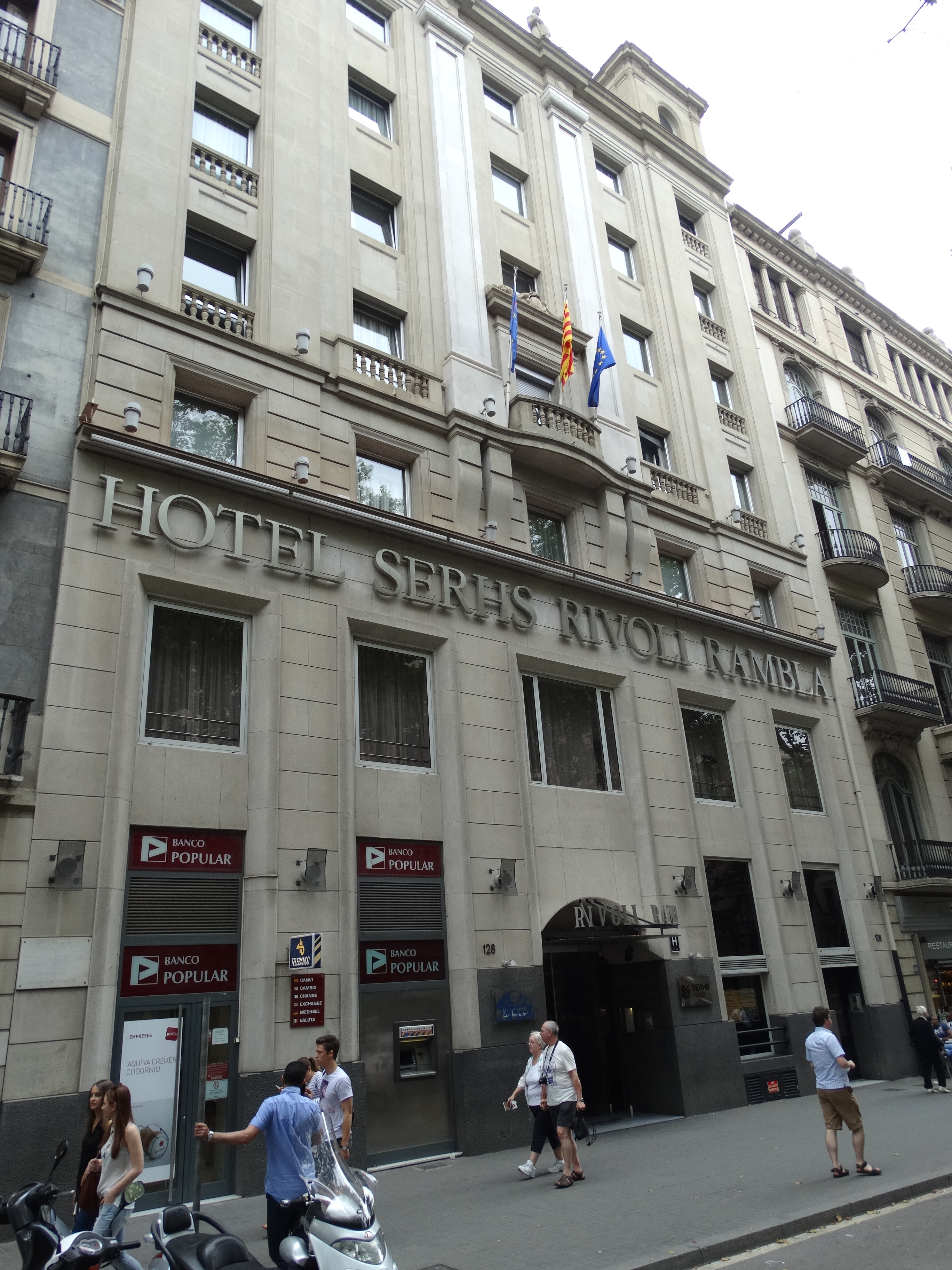 Hotel Rivoli Rambla - Former POUM Headquarters - Barcelona - Spain